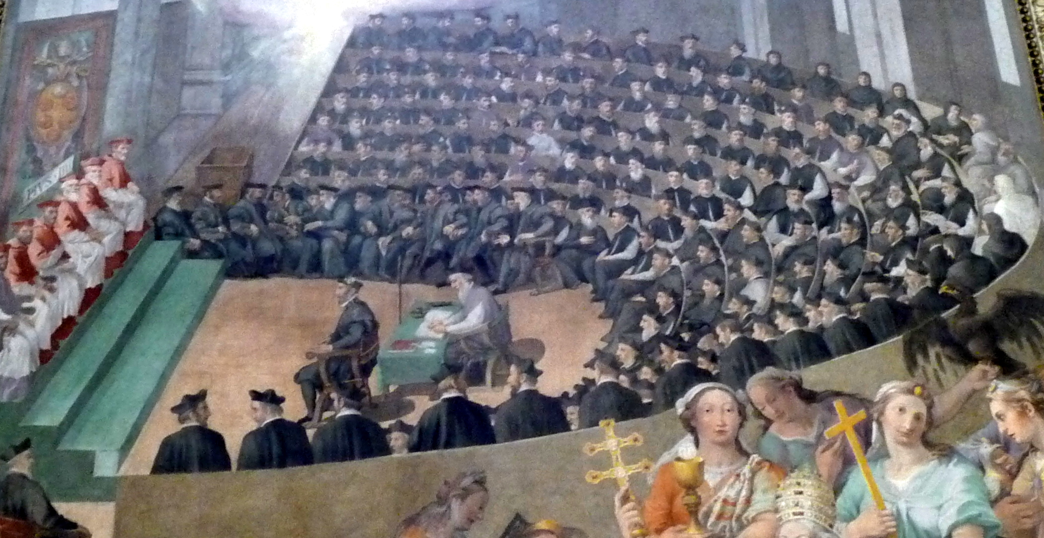 detail